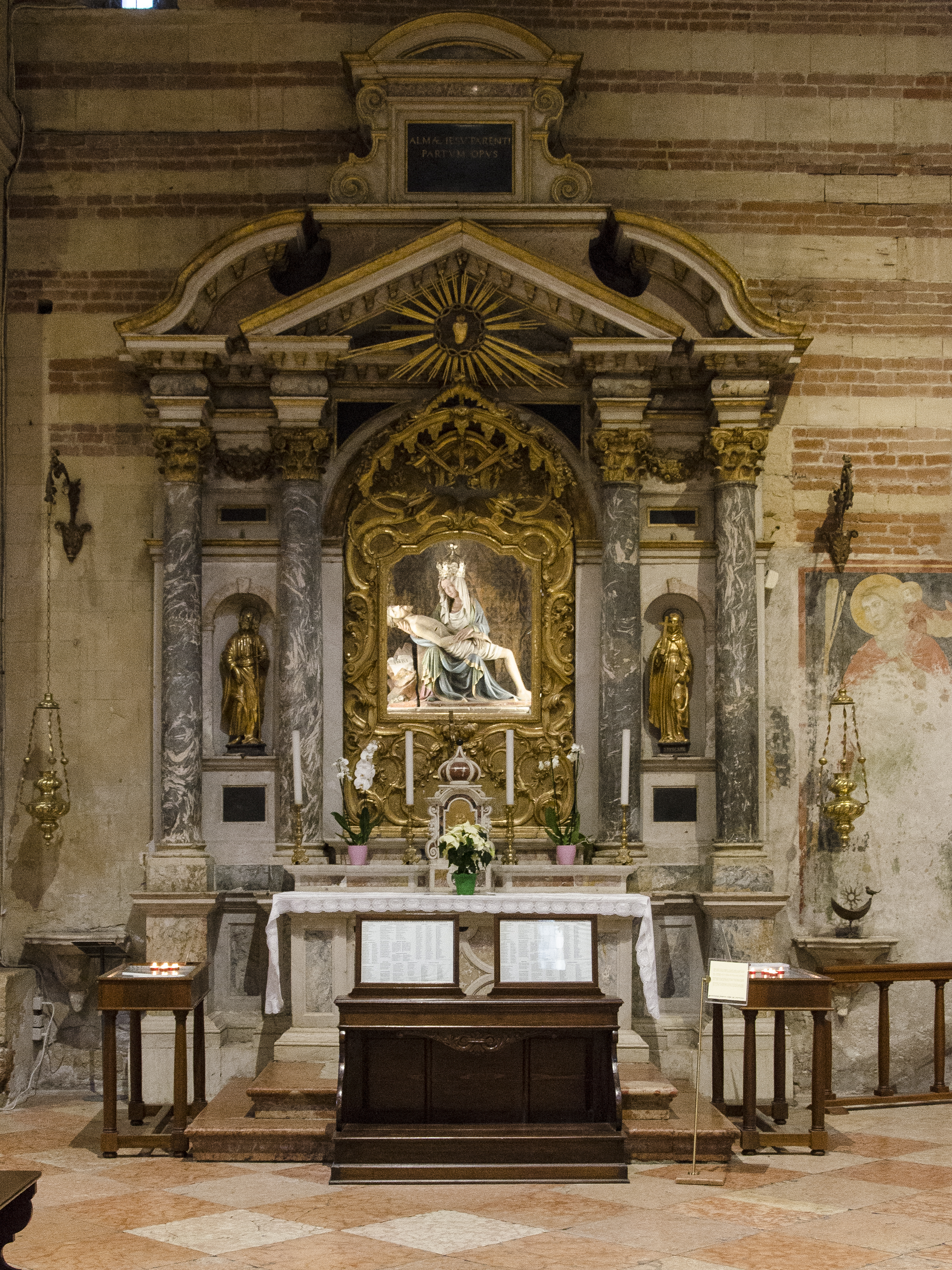 Foto degli interni della chiesa